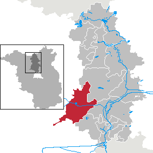 Kremmen in Brandenburg (Country) - District Oberhavel